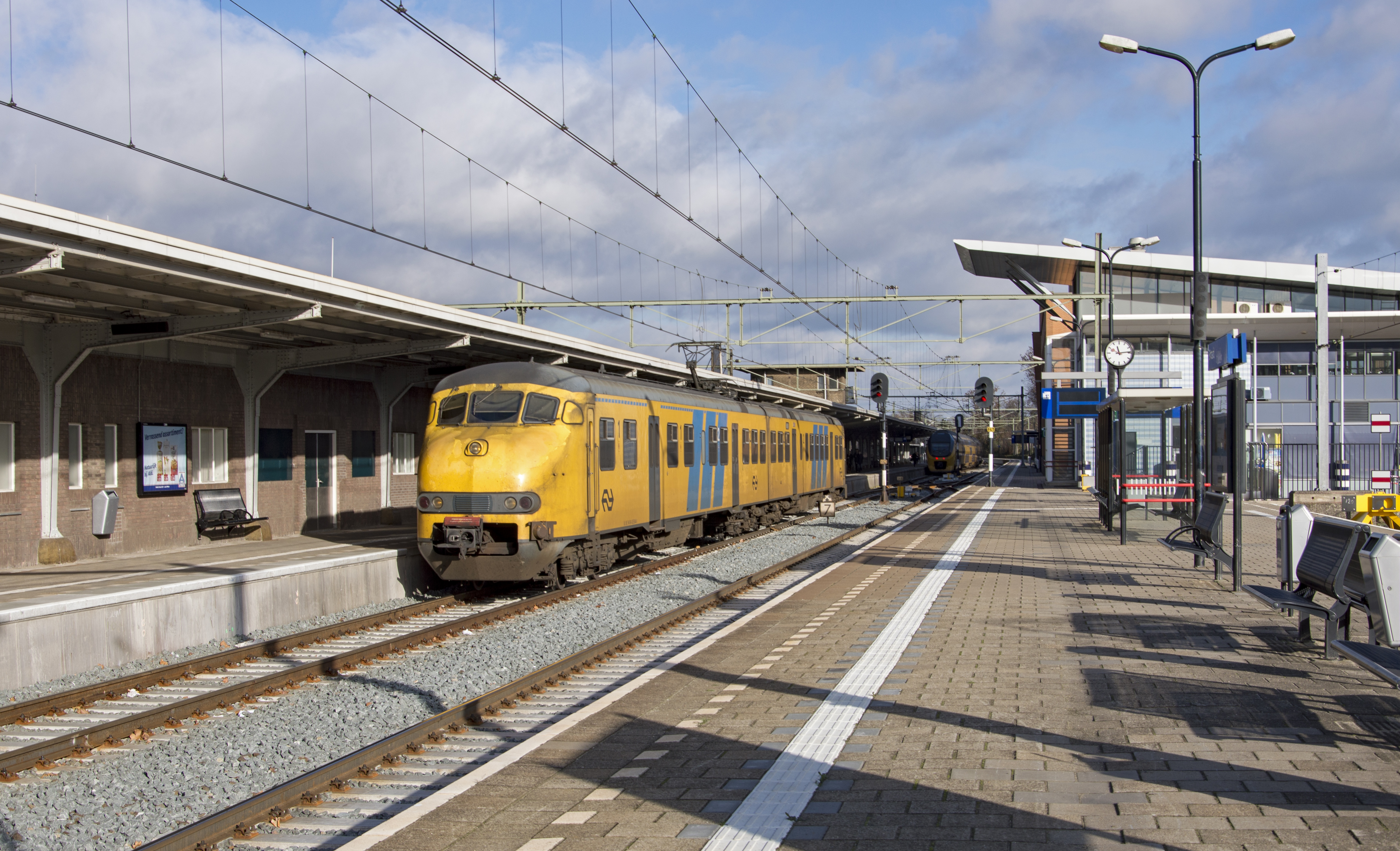 In Sittard staat Plan V 444 als Sprinter 6929 klaar voor vertrek naar Heerlen.